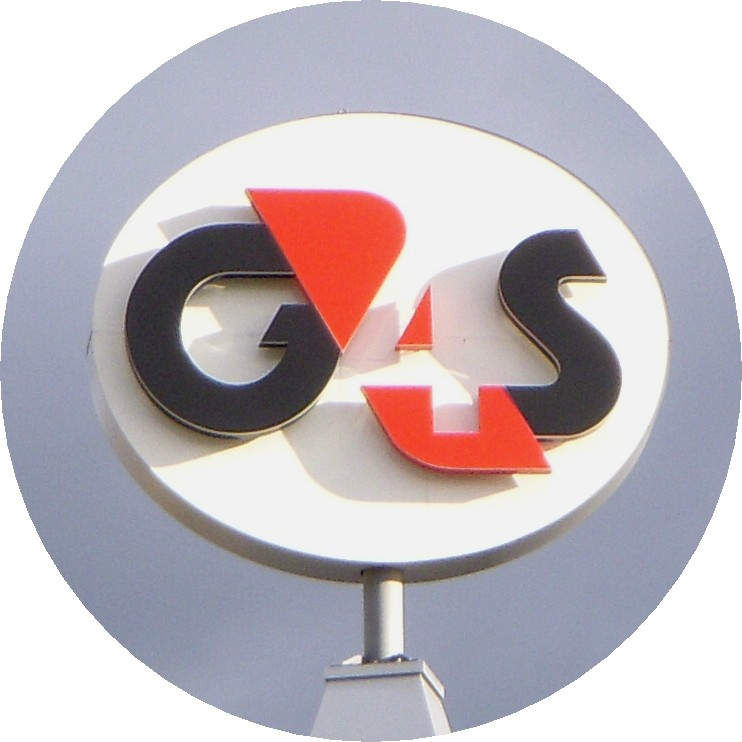 G4S, skylt på taket i Västberga, Stockholm